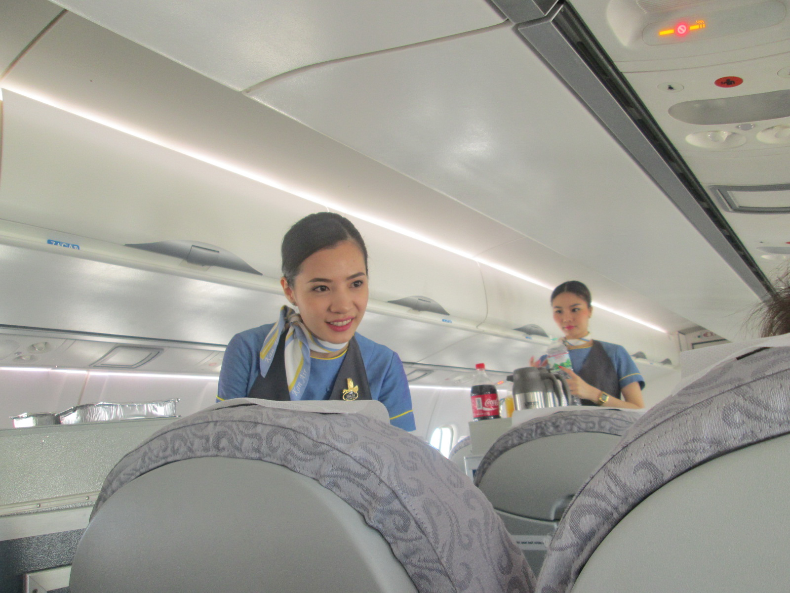 การบริการอาหารและเครื่องดื่มบนเที่ยวบินของกานต์แอร์